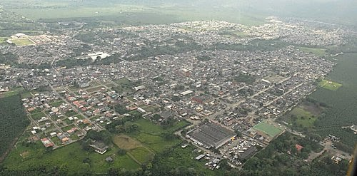 Apartadó